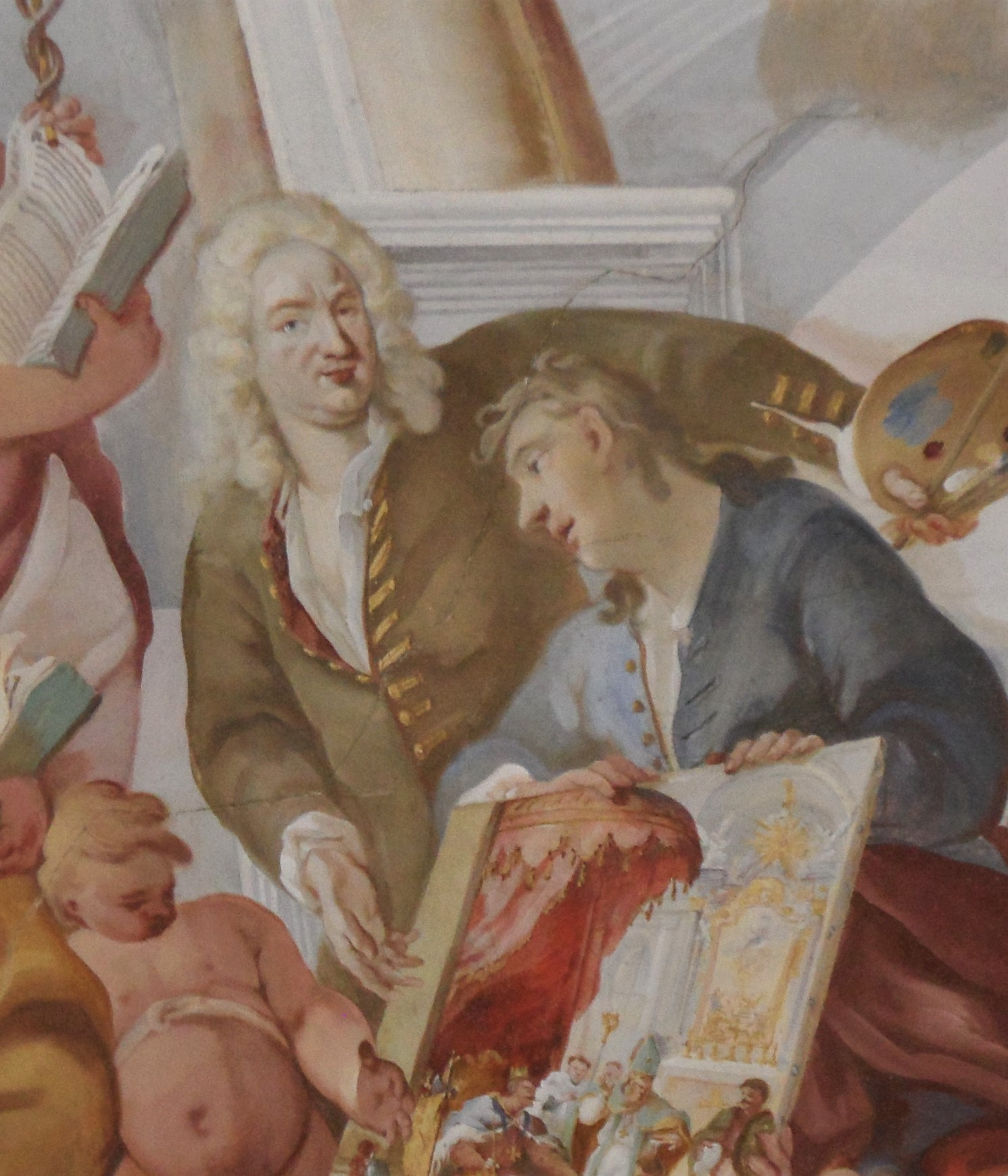 Autoportrét Františka Řehoře Ignáce Ecksteina (1689? – asi 1741) na fresce ve slavnostním sále zámku Milotice (1725)